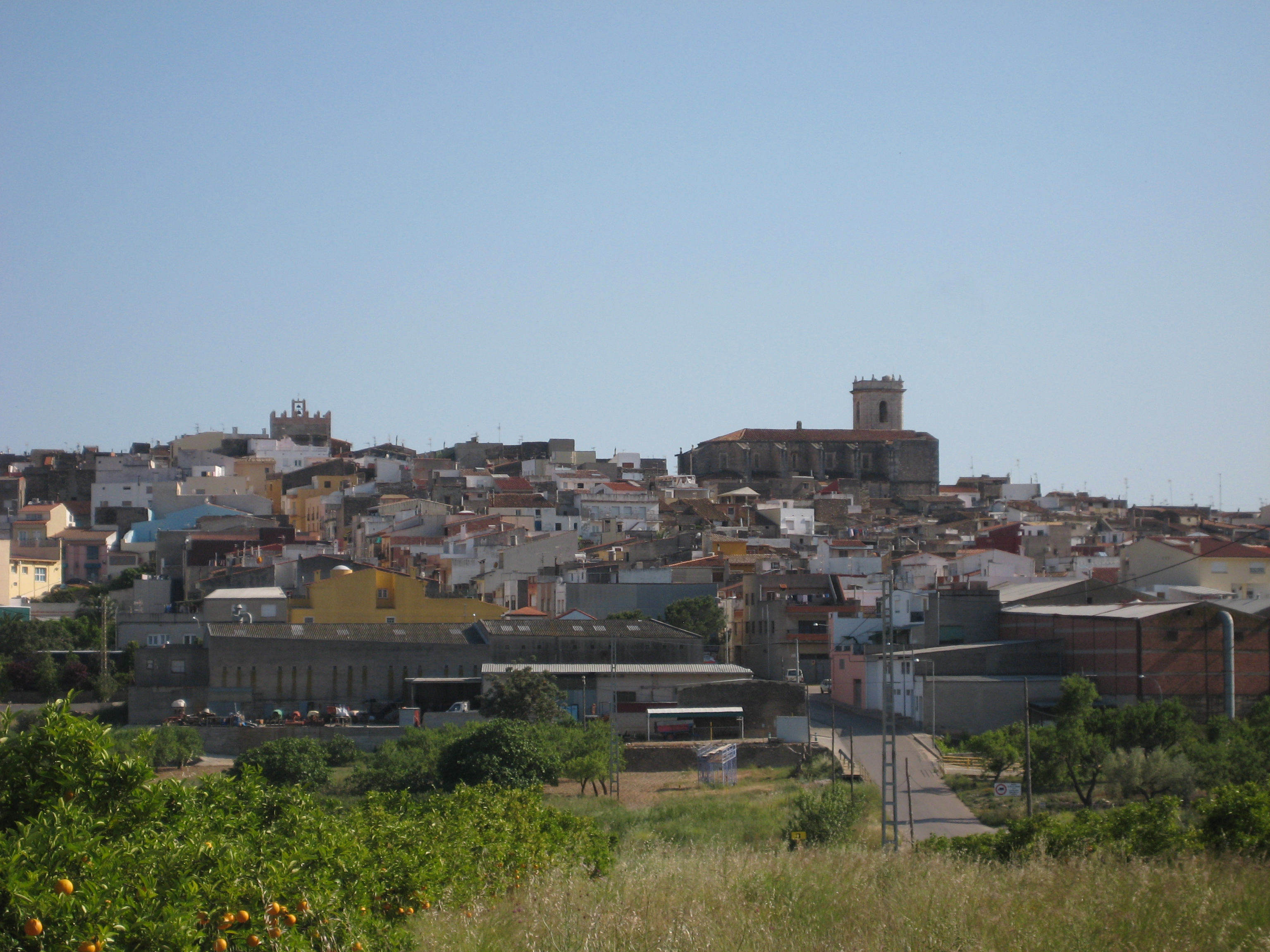 Vista de Càlig (Baix Maestrat)